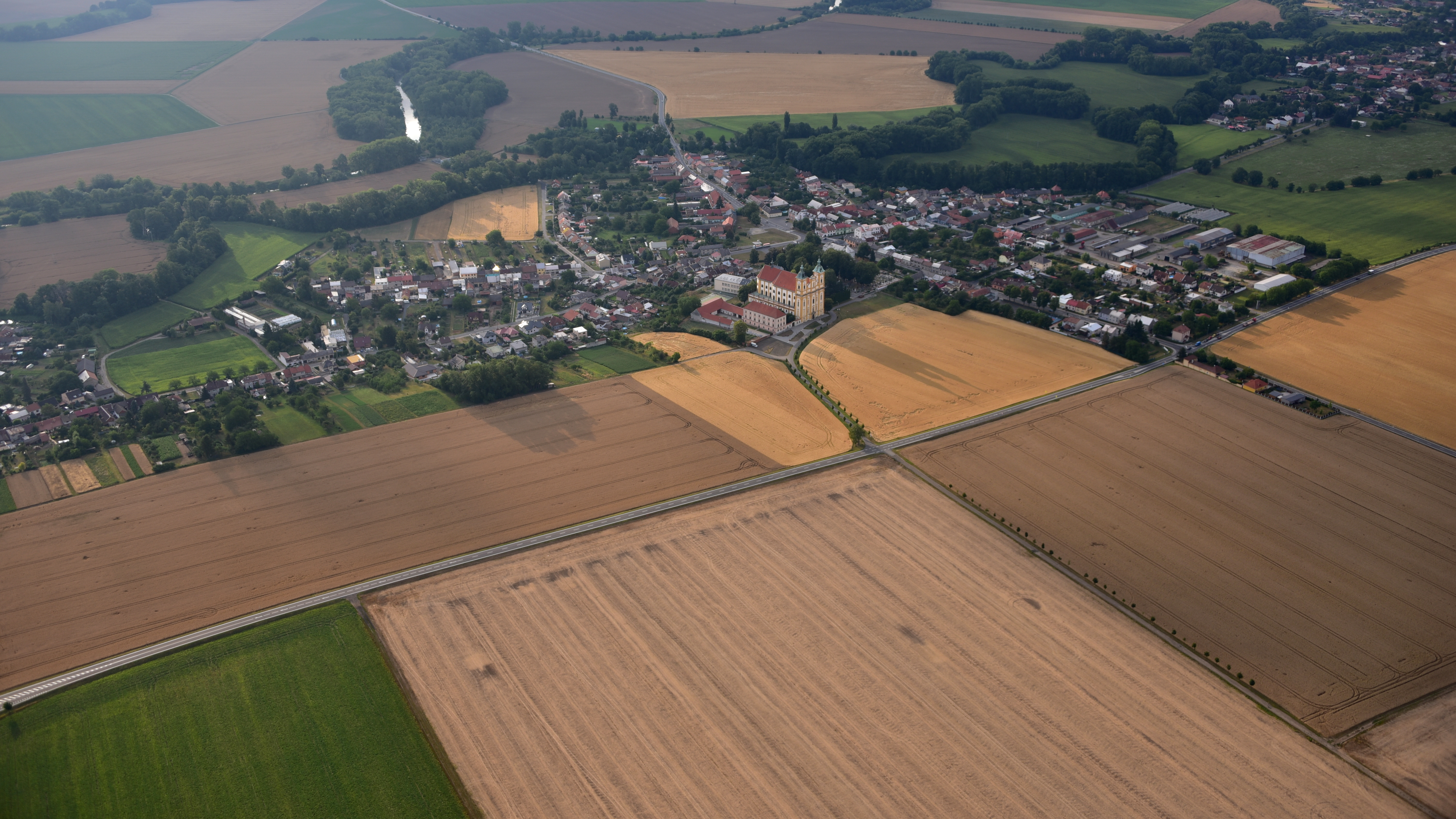 CZ - Dub nad Moravou, Luftaufnahme (2018)